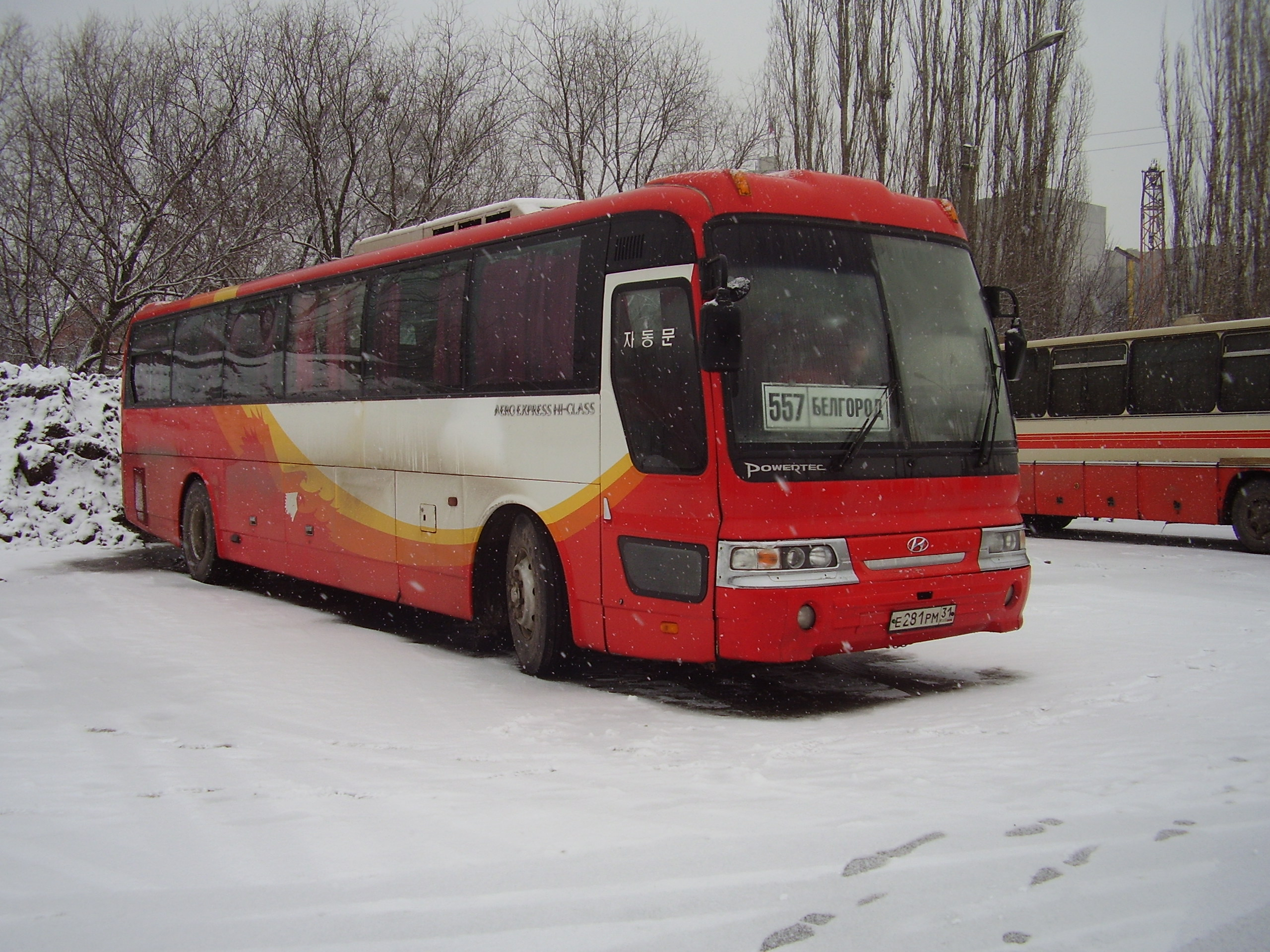 Автобус Hyundai AeroExpress на маршруте Воронеж-Белгород - Bus Hyundai AeroExpress Voroneg-Belgorod